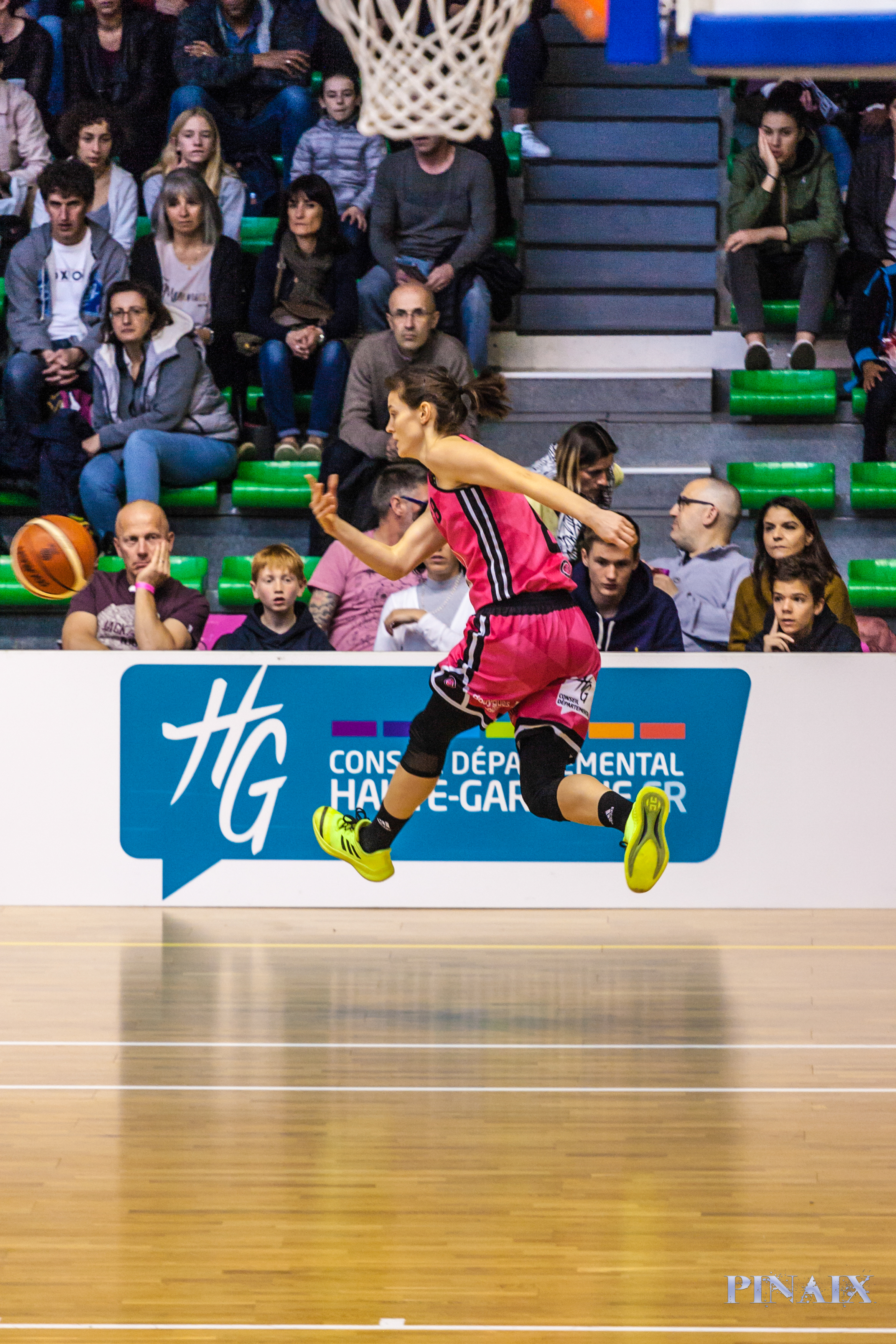 Isabelle Strunc lors d'un match de LF2